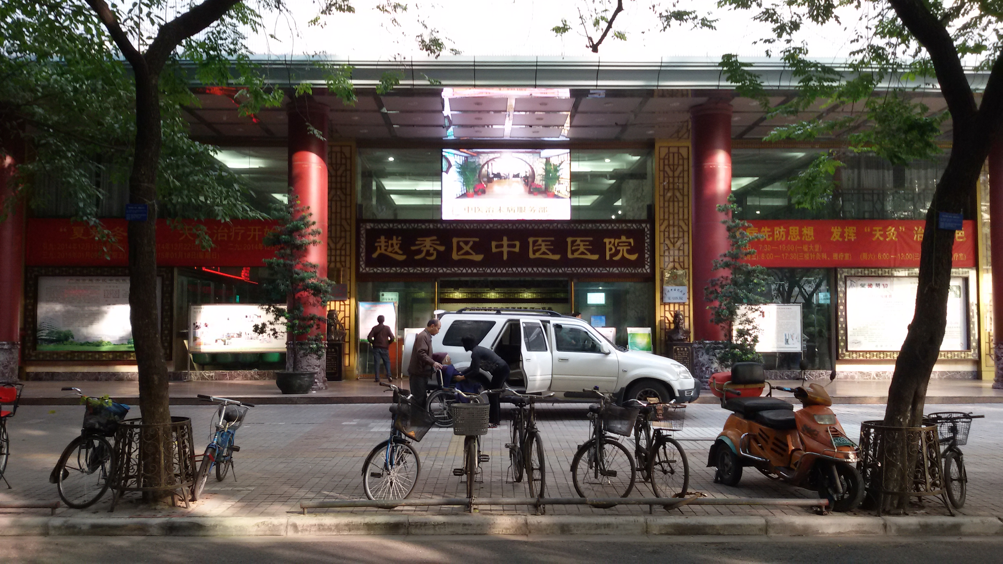 粵語: 越秀区中医医院／越秀區第一人民醫院